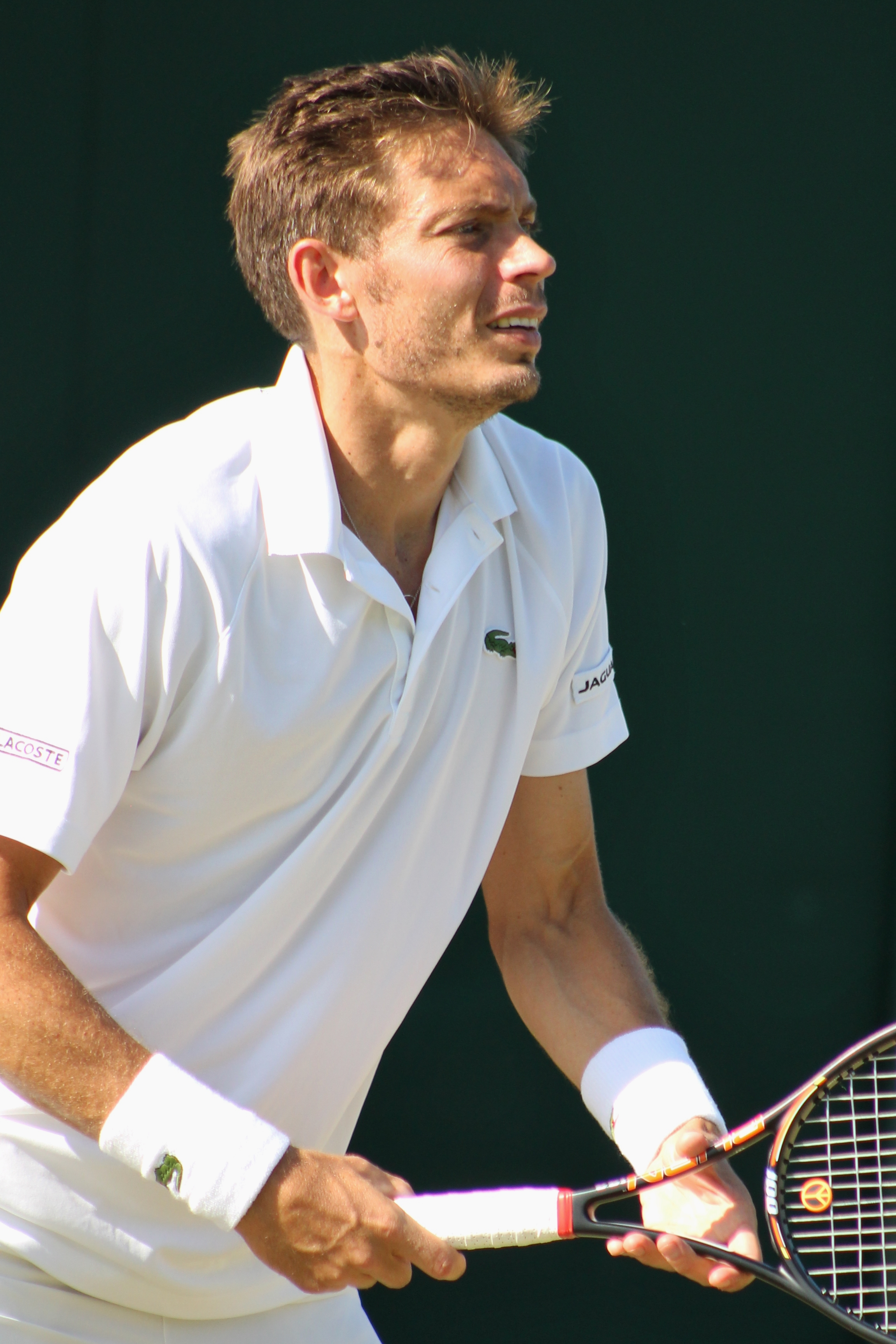 Mahut WM15 (3)